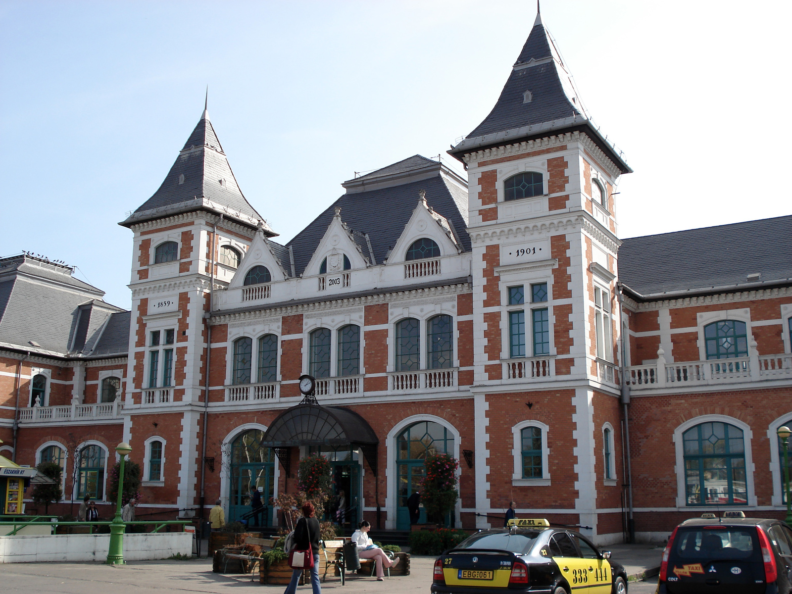 Tiszai pályaudvar (Miskolc, Kandó Kálmán tér) This is a photo of a monument in Hungary. Identifier: 2951